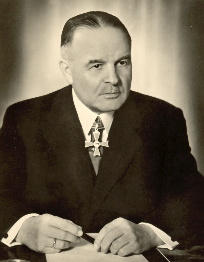 Foto von Walter Wiederhold (1885-1959), Lackfabrikant in Hilden